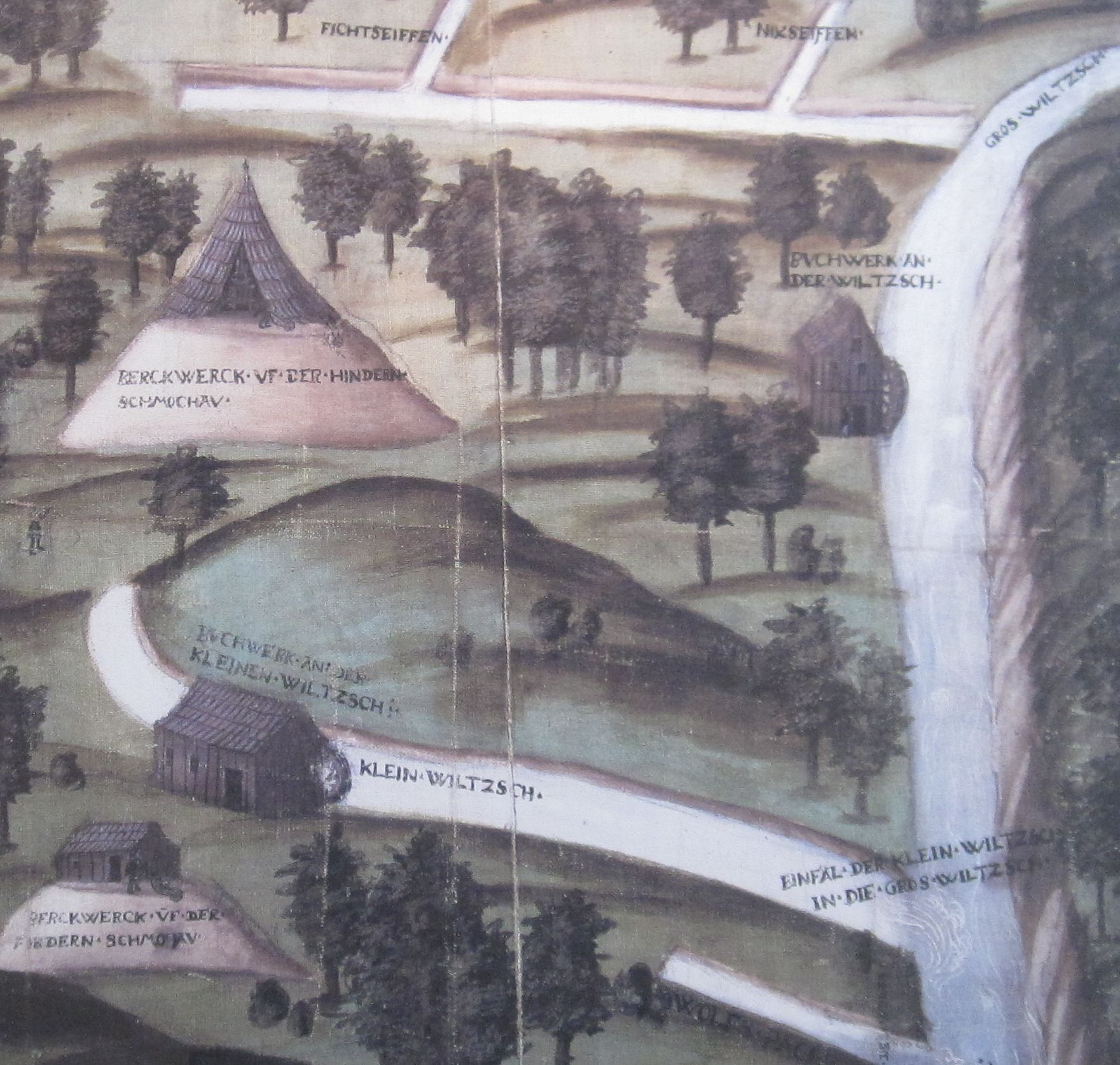 Eibenstock. Bildkarte der Bergwerke Vordere und Hintere Schmochau bei Eibenstock, um 1520. Auch Details aus der Bildkarte. Sächsisches Staatsarchiv – Bergarchiv Freiberg Nr. K 9390, ausgestellt in den musealen Räumen des Bergarchivs im Erdgeschoß des Schlosses Freudenstein in Freiberg. Der dortige Erläuterungstext zu der auf Textilgewebe gemalten Karte lautet: „Die Bildkarte ist die älteste Darstellung von Bergbauanlagen im Bergarchiv Freiberg. es handelt sich um eine Ansicht des bedeutenden Zinnbergbaugebietes südwestlich der Bergstadt Eibenstock im Westerzgebirge. Zu den bekanntesten und ertragreichsten Gruben im Umfeld der erst später gegründeten Ortschaft Carlsfeld gehörten die Gruben ‚Fleschmaul‘, ‚Spindel‘, ‚Rosszeche‘ und ‚Schmuge‘. Die auf der Karte dargestellten Bergwerke ‚Vordere und Hintere Schmo(c)hau‘ mit den dazugehörigen Aufbereitungsanlagen können durchaus mit den bei Georg Agricola erwähnten Bergwerken ‚Alte und Junge Schmuge‘ identisch sein. Vermutlich steht die Anfertigung dieser Karte im Zusammenhang mit der Darstellung von bergrechtlichen Grenzen.“